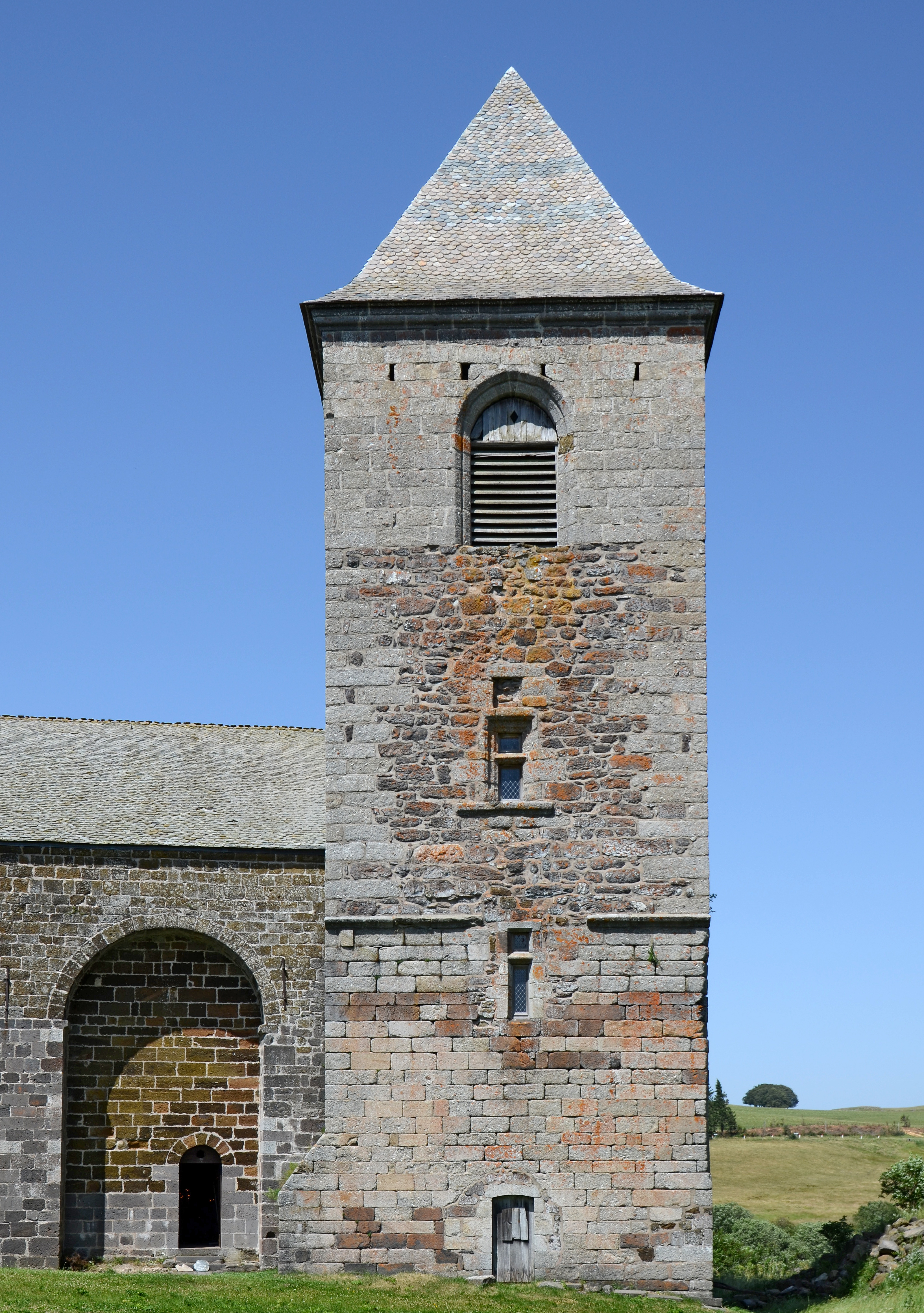 Église ND-des-Pauvres dans le hameau d'Aubrac, Saint-Chély-d'Aubrac, Aveyron, France .